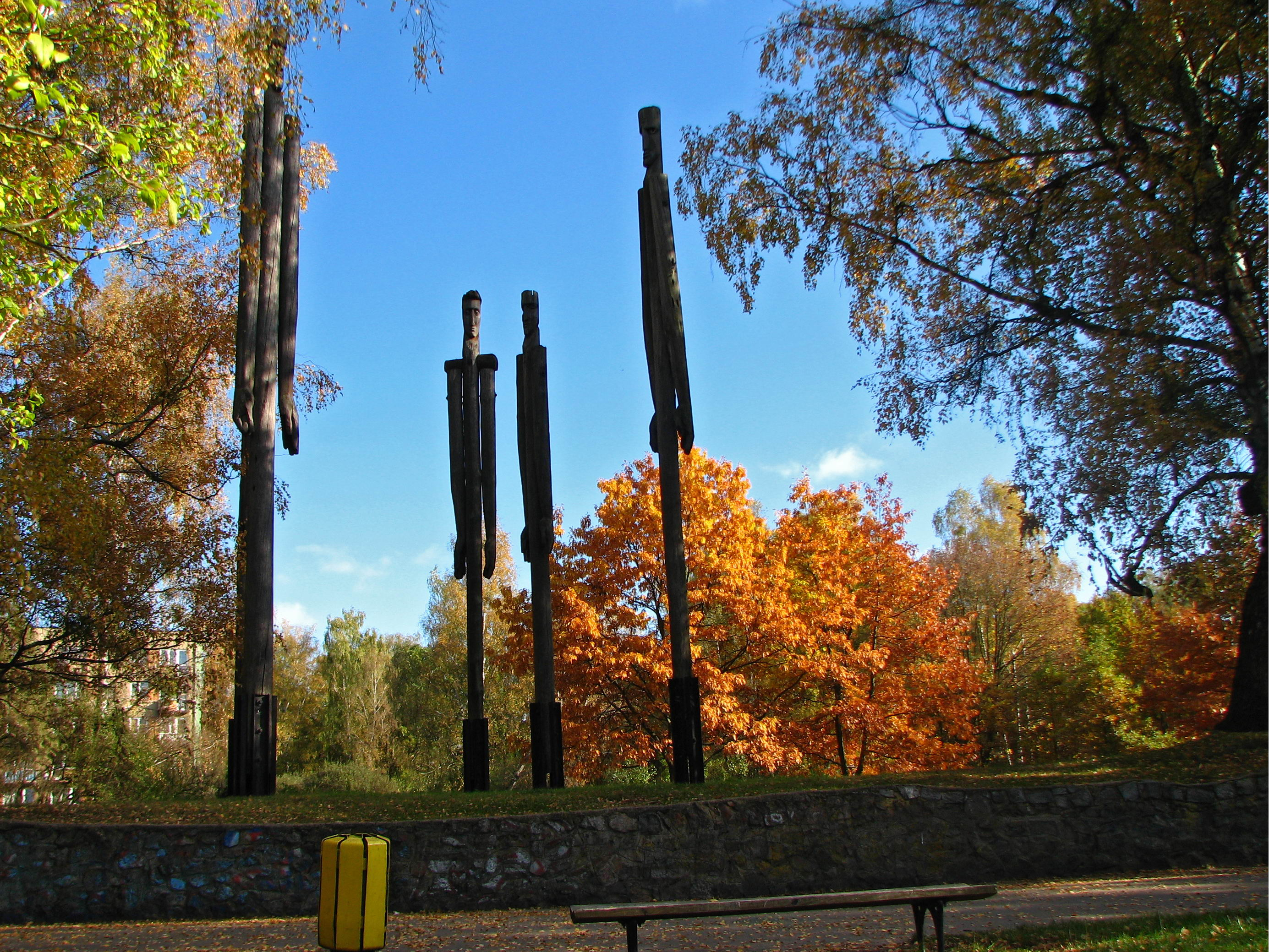 Pomnik w parku miejskim w Hajnówce.